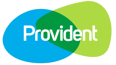 logo Provident Financial S.R.O.